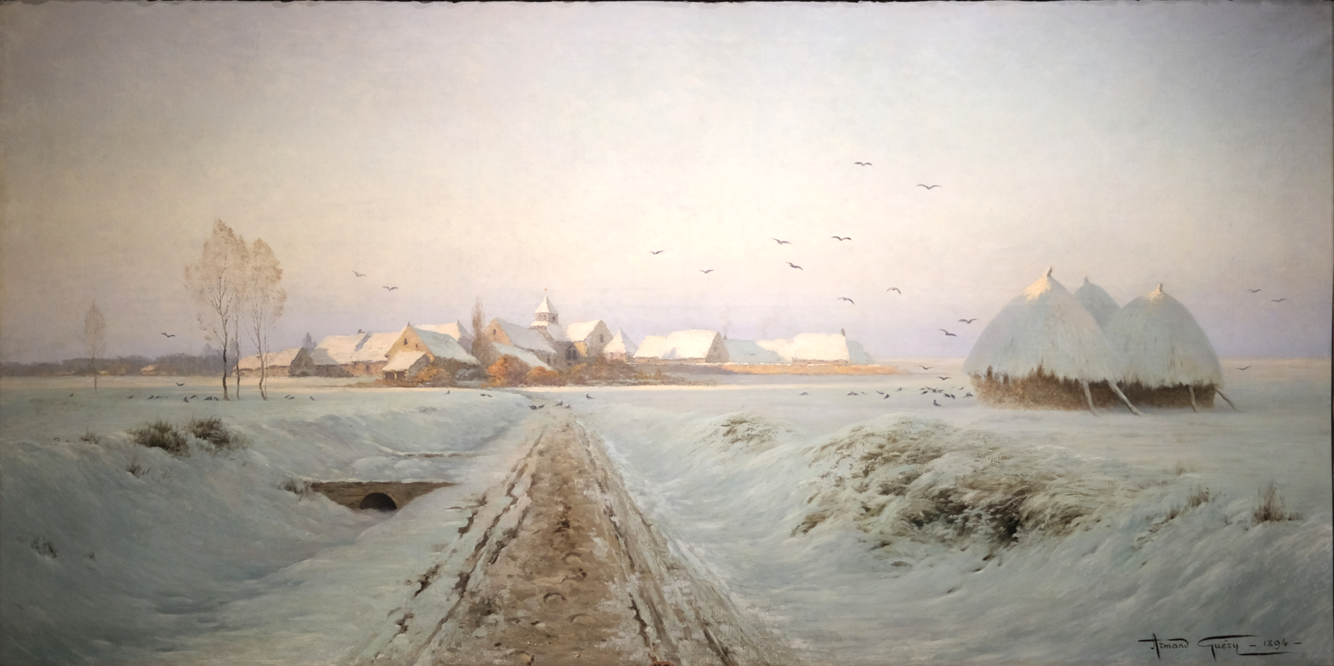 Soir d'hiver a Bertricourl (Armand GUERY) - Musée de Reims Oeuvre n° 878 au Salon de 1894, le tableau est alors appelé "Soir d'hiver, Bertricourt, environs de Reims"